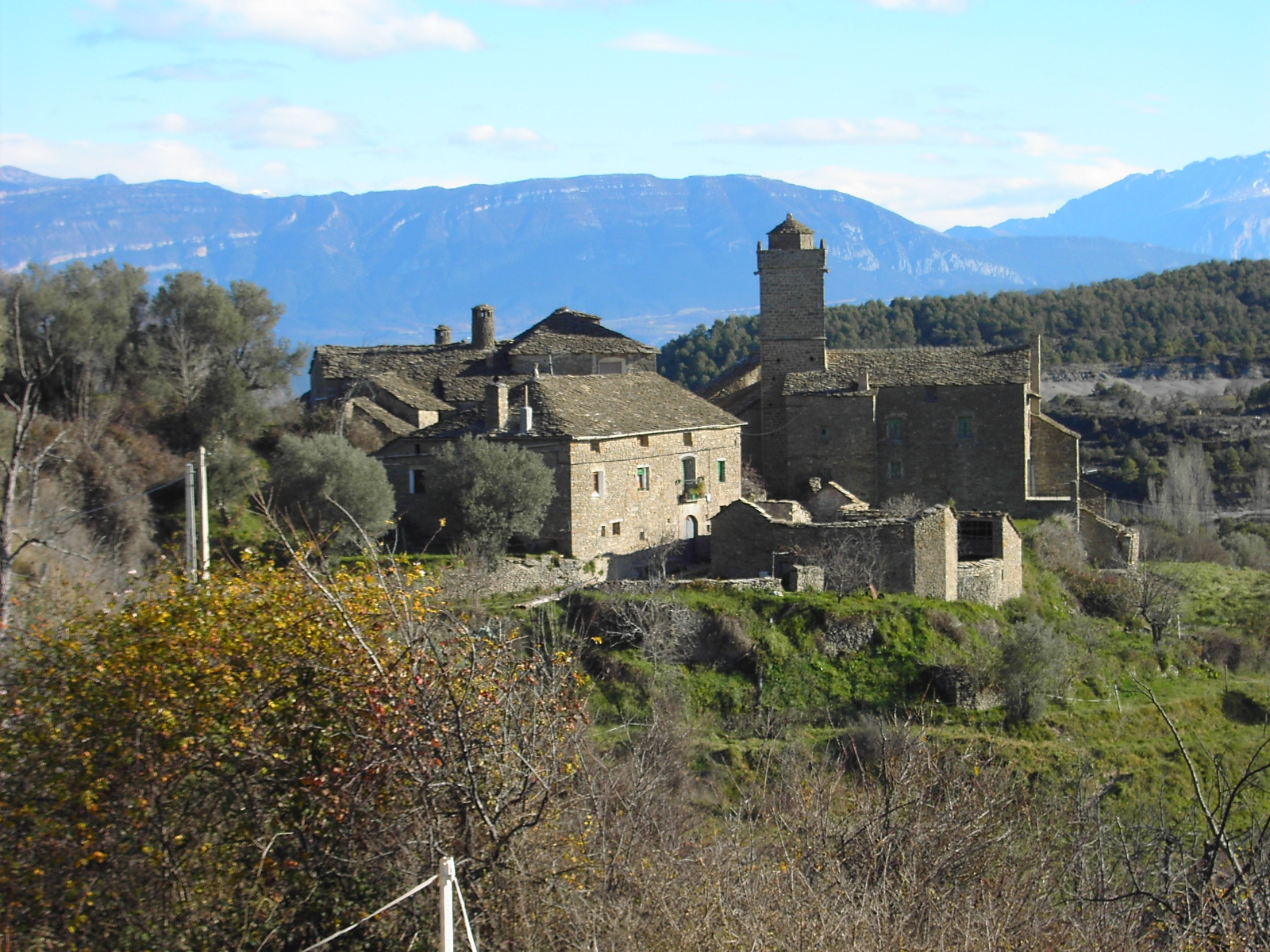 Buil, actualmente más conocido como Santa María de Buil, es un núcleo que actualmente pertenece a an:l'Aínsa-Sobrarbe, se encuentra en la depresión de Arcusa en el Biello Sobrarbe. Componen esta población dos núcleos (o Bicos en el aragonés de la zona) bien diferenciados: San Martín de Buil y Santa María de Buil, cada uno toma el nombre de su iglesia. La Iglesia de Santa María de Buil es románica y una de las más grandes de su época en la zona, hasta tal punto que se la conoce popularmente como La Catedral de Sobrarbe.